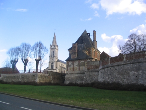 Vue de l'église et du porche du château de Dampierre-en-Burly